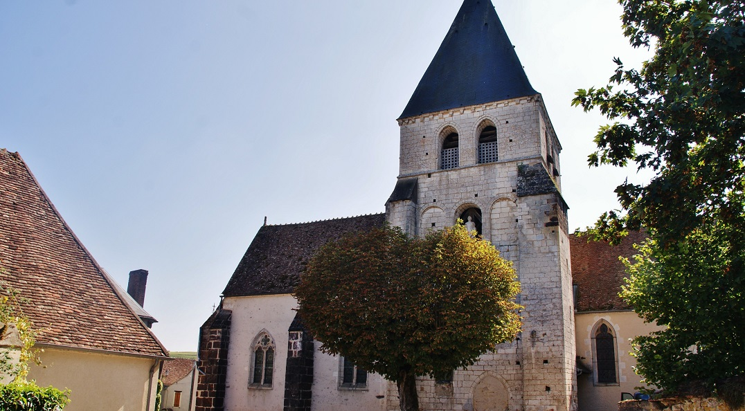 église St Etienne